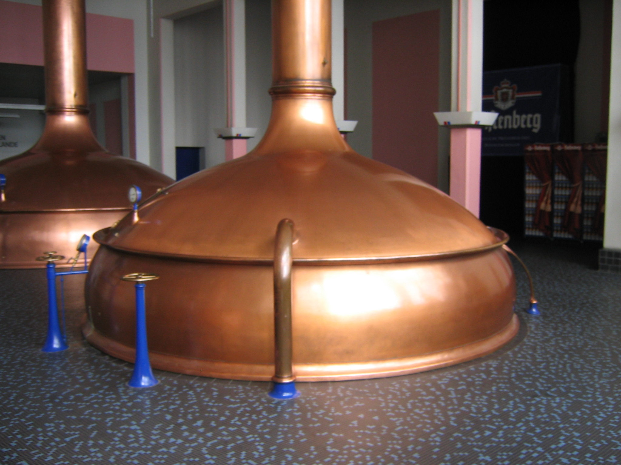 Sudfass in der Brauerei Fürstenberg, Donaueschingen